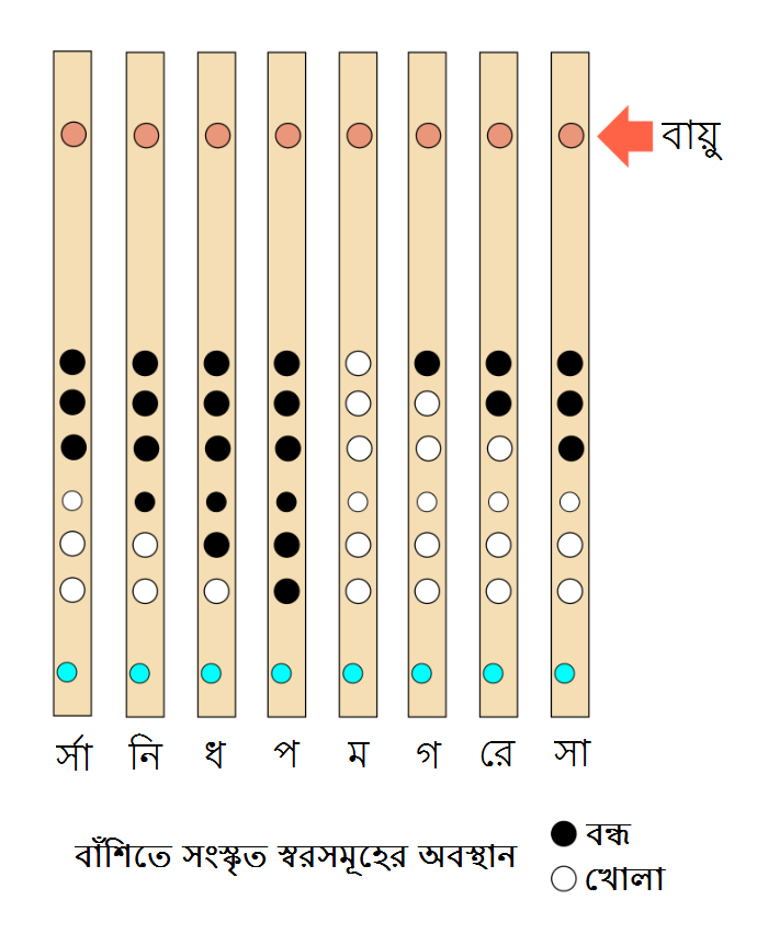 বাঁশিতে আঙুল রাখার মাধ্যমে সুর তৈরি করার তালিকা।